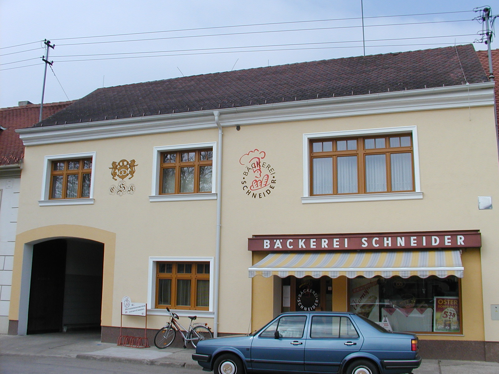 Sitzendorf Hauptplatz 18